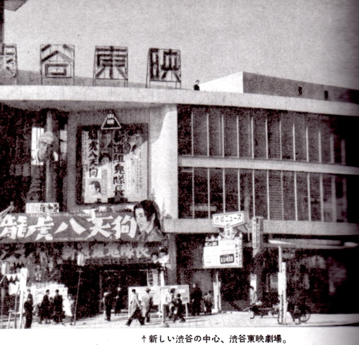 東京都渋谷区の映画館「渋谷東映」。